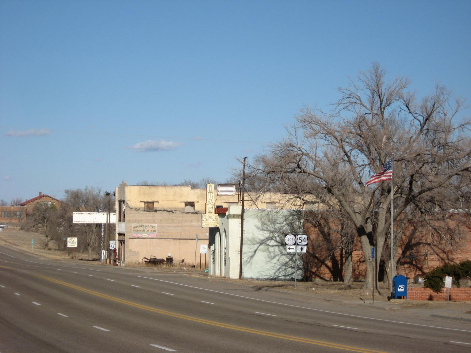 Nara Visa, New Mexico